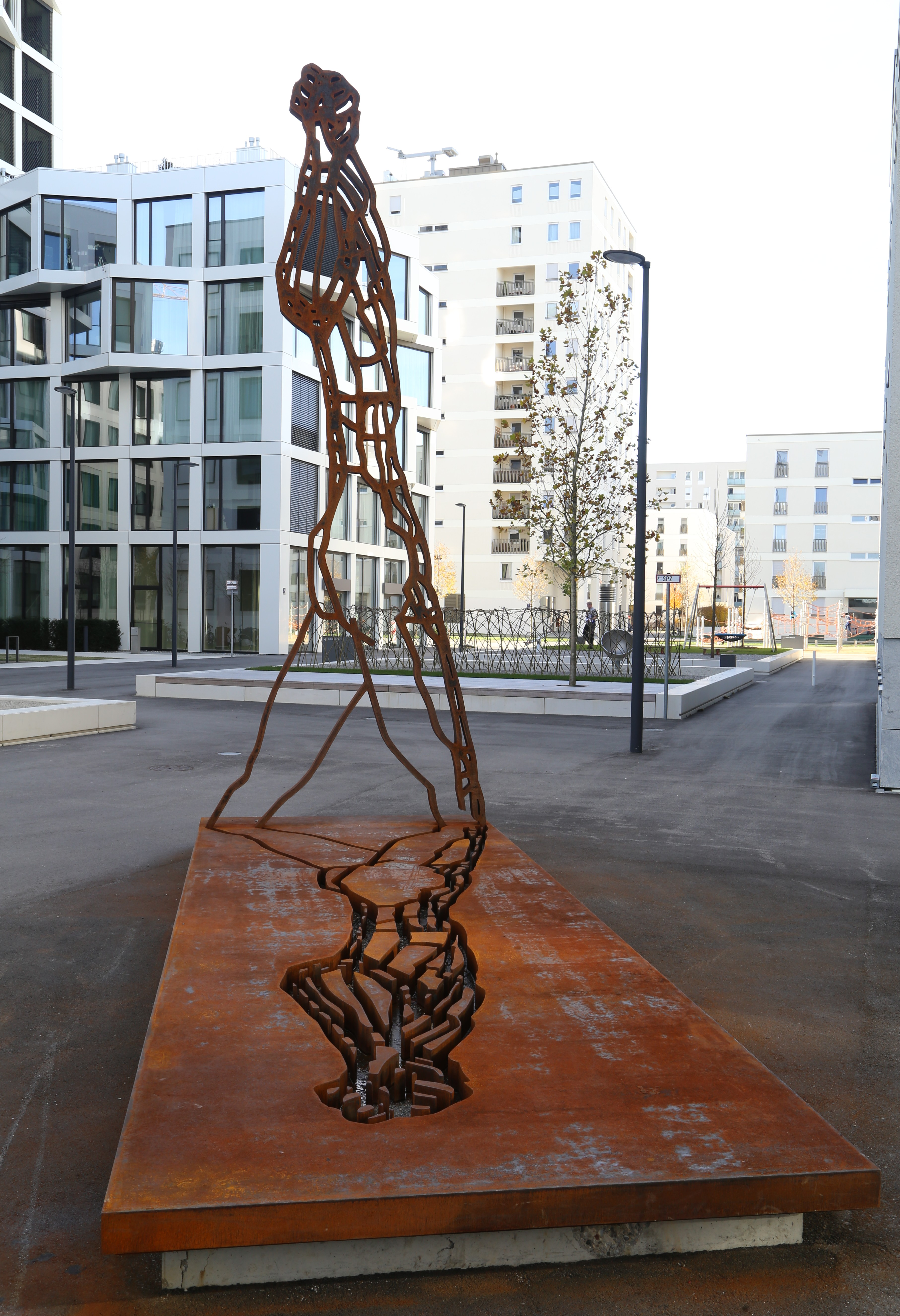 Michael Morgner: Der Schreitende (2016), Stahl, 10 Tonnen, ca. 5 Meter hoch, Birketweg 37, München Michael Morgner (1942– ) DescriptionGerman painter German painterDate of birth6 April 1942Location of birthChemnitzAuthority control : Q1928641 VIAF: 22933916 ISNI: 0000 0000 2642 3715 LCCN: n83216258 GND: 11858409X SUDOC: 152388419 WorldCat